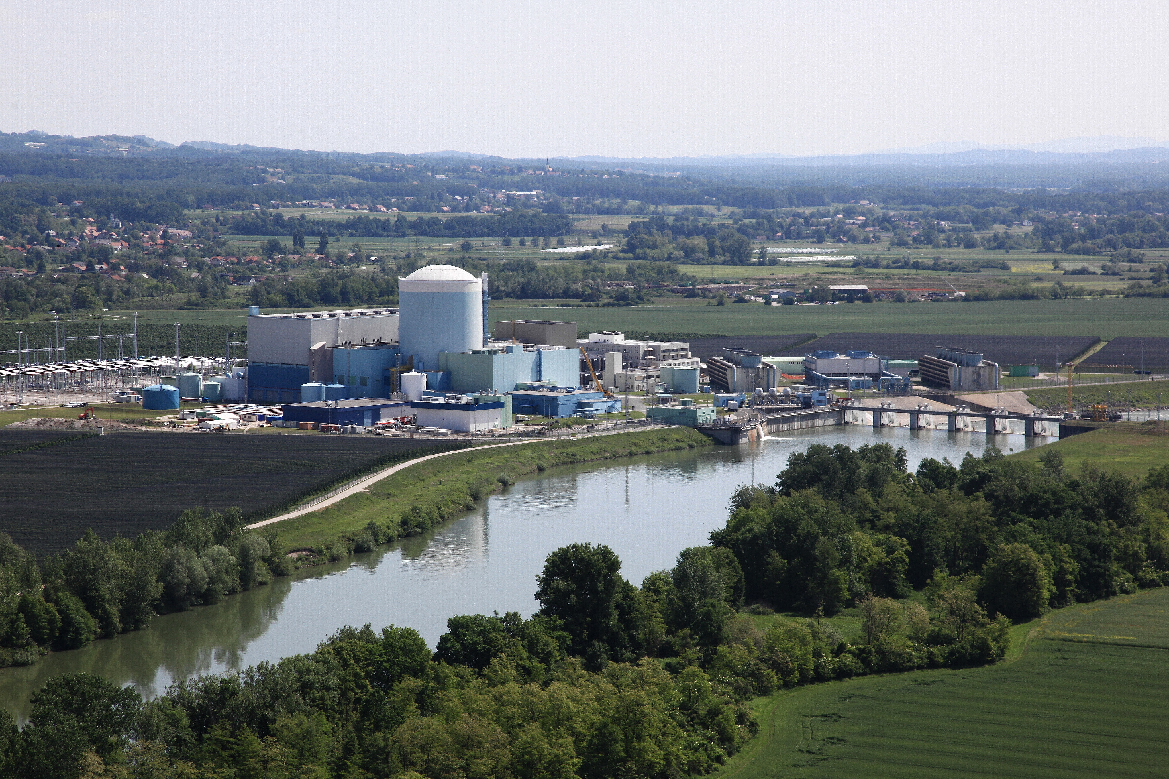 Nuklearna elektrarna Krško se nahaja v Vrbini, v Krškem.